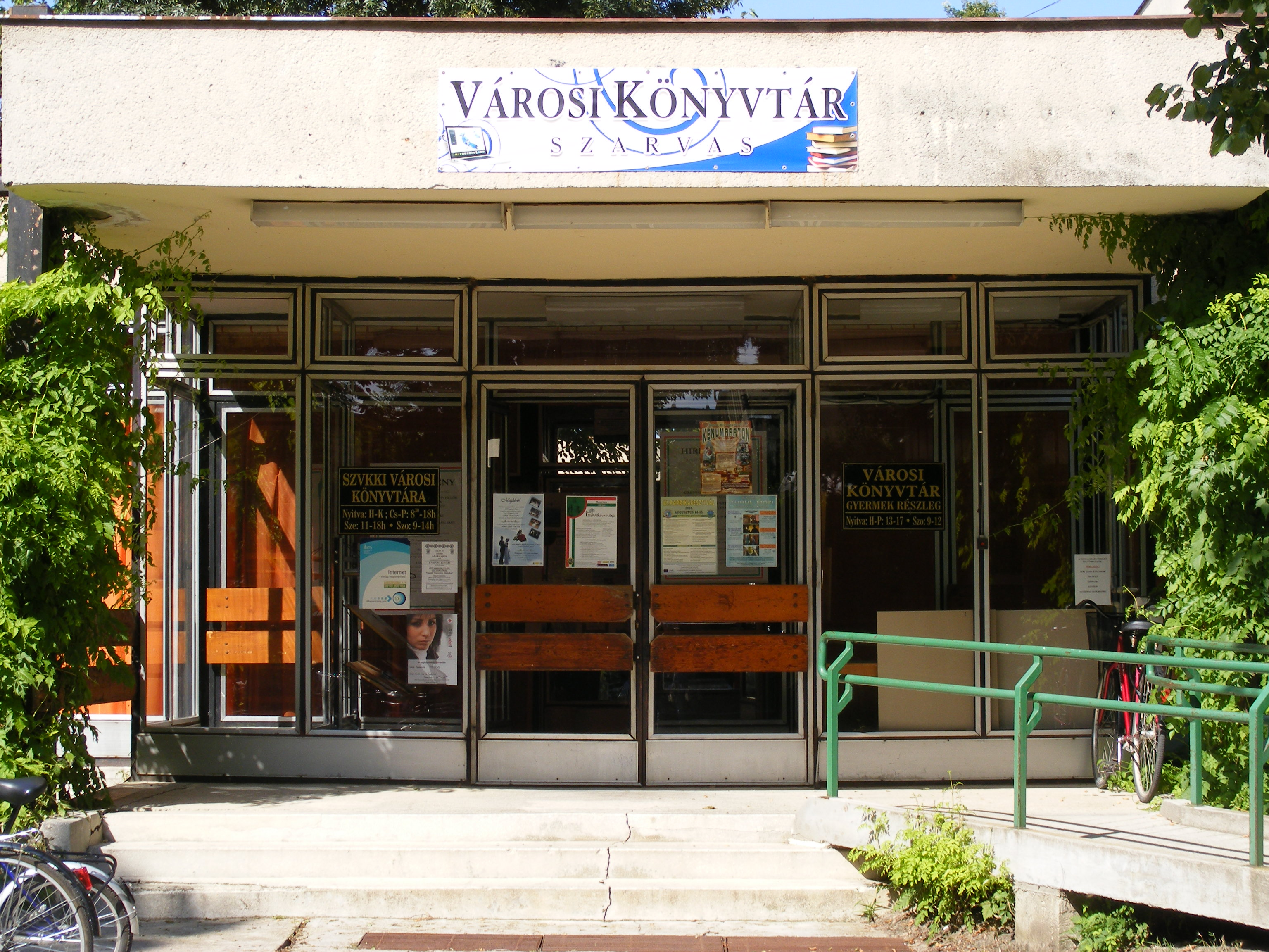 A Szarvasi Városi Könyvtár